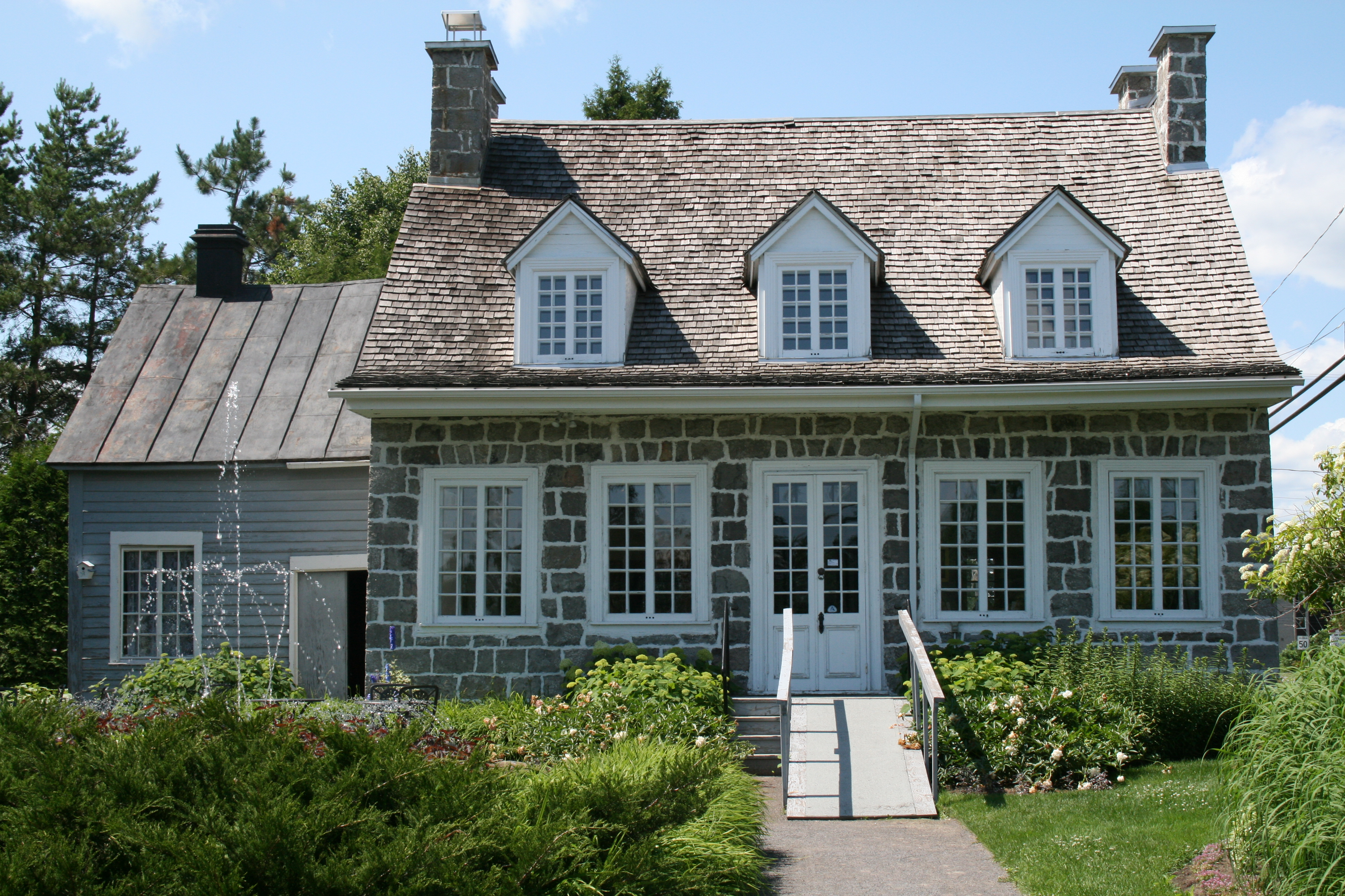 La maison Antoine-Lacombe a été construite vers 1840 et elle est situé à Saint-Charles Borromée. Elle a été classée monument historique en 1968.